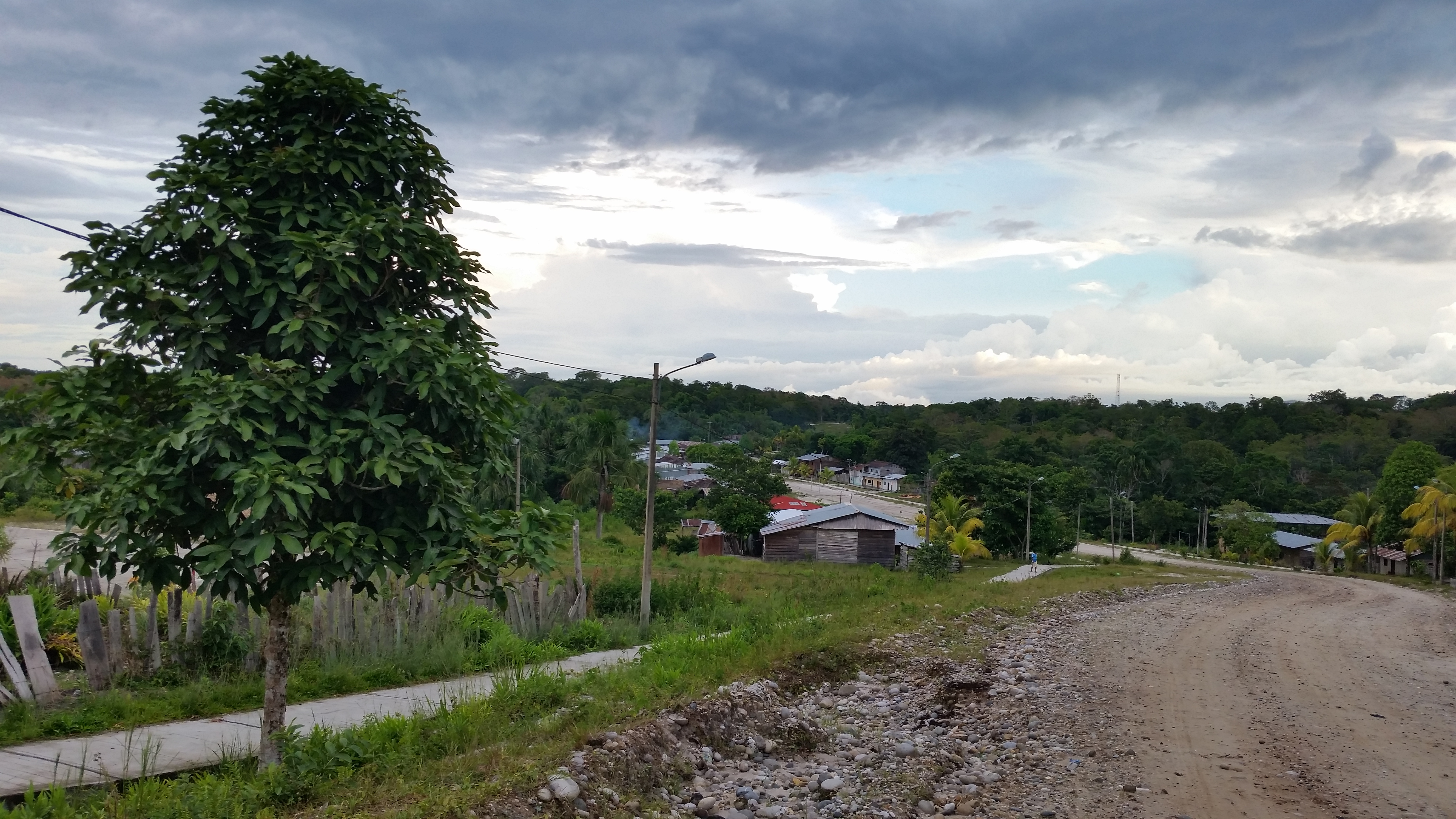 Estación 5 - Sarameriza